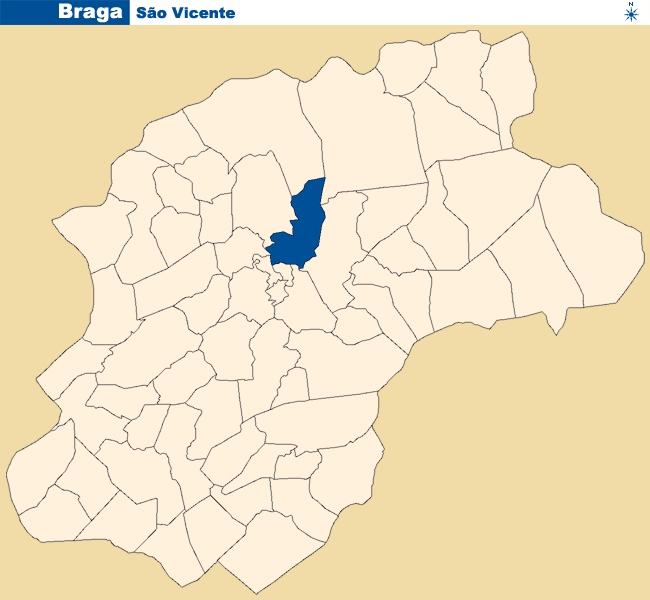 Localização de São Vicente no concelho de Braga.